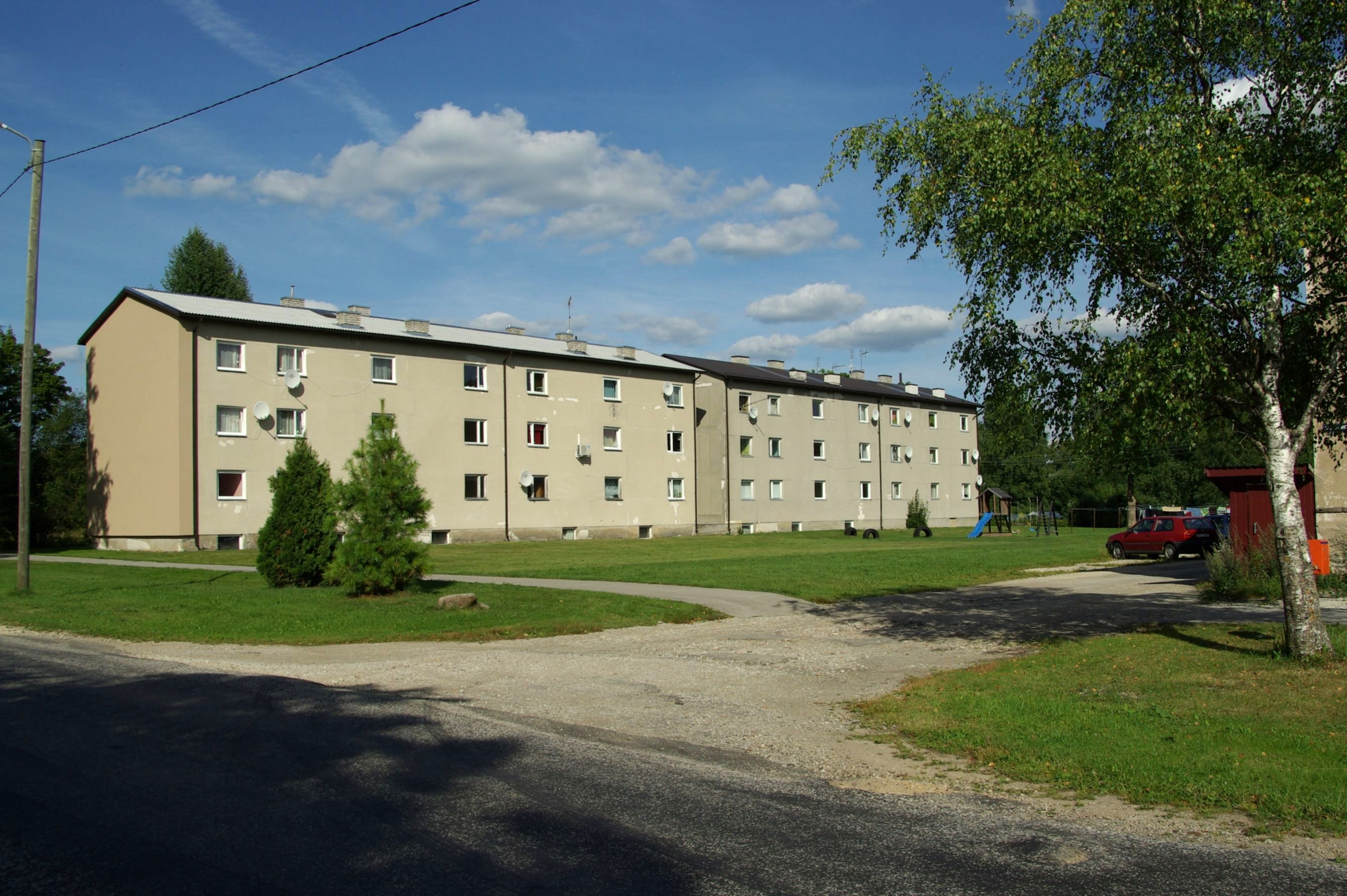 Rapla maakond, Kehtna vald